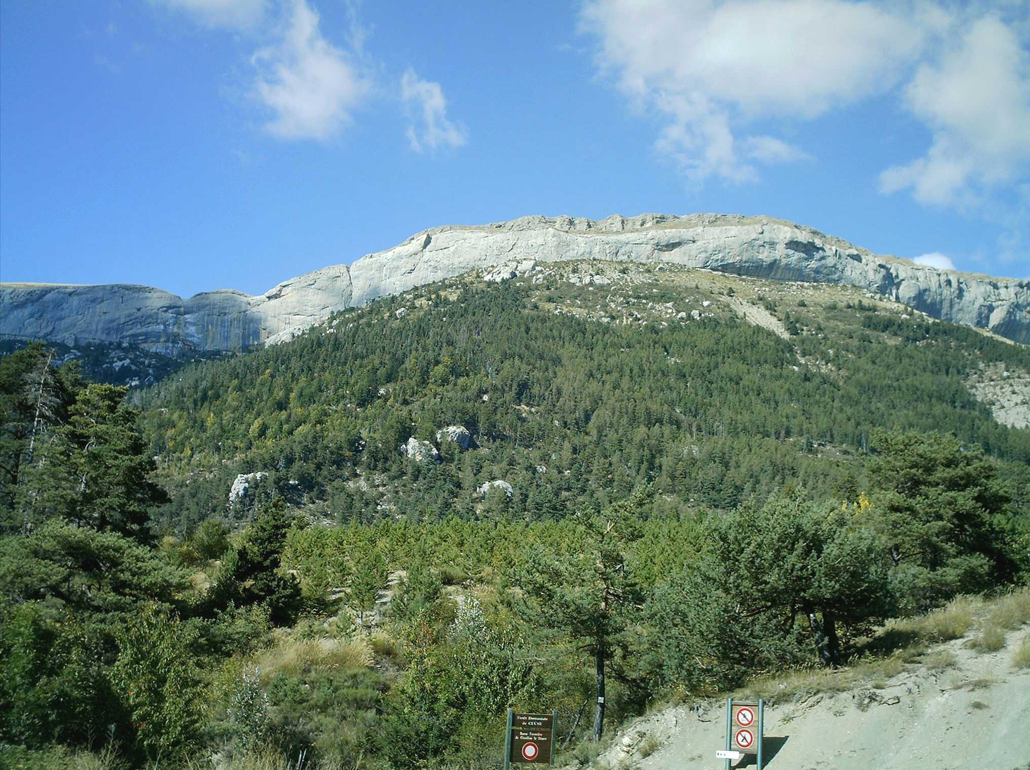 Vue du versant sud de la corniche de Céüse( les Sciés - 1812m) depuis le col des Guérins( 1312m). Départ de la piste forestière de Châtillon le Désert.